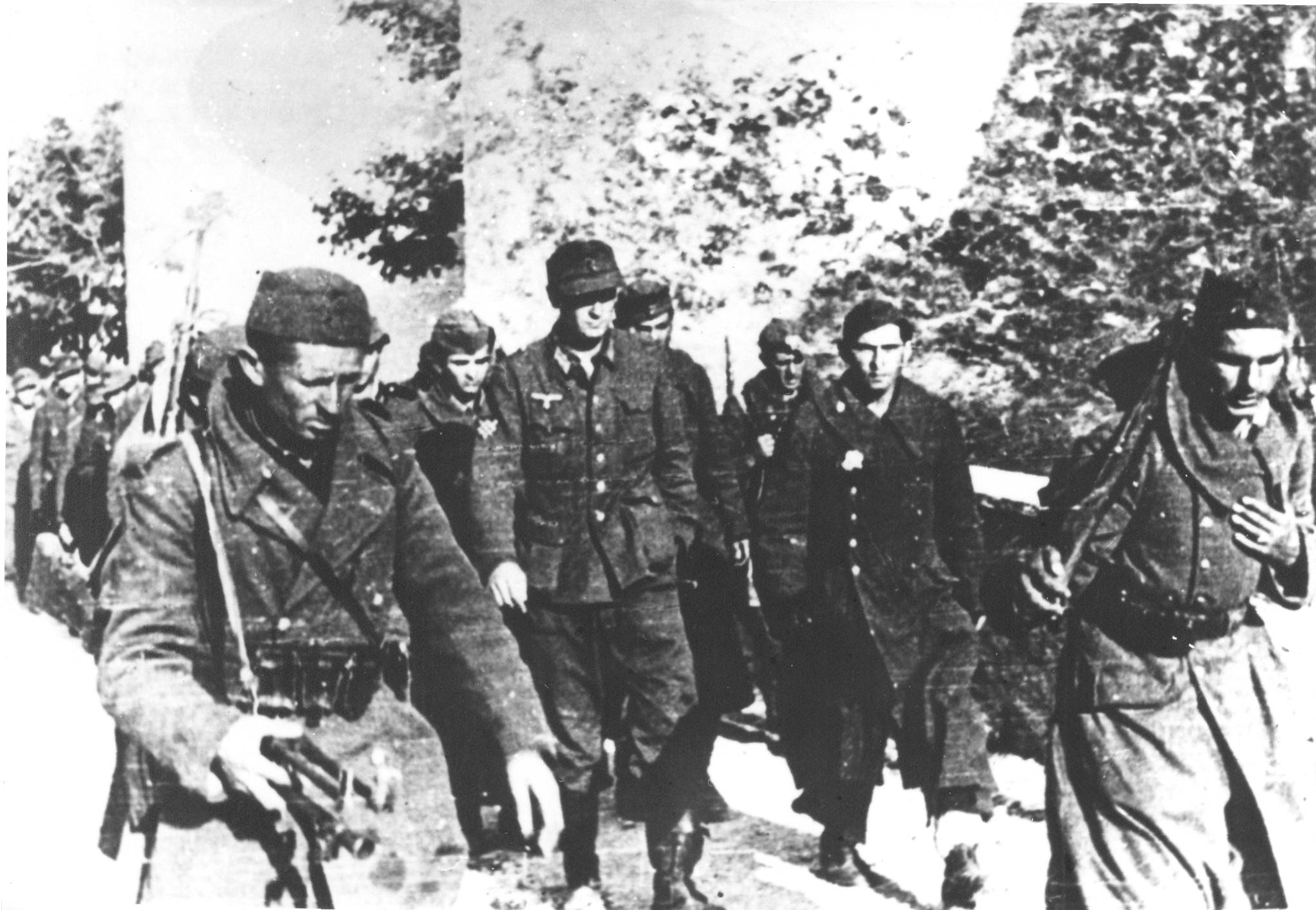 Partigiani jugoslavi trasferiscono prigionieri della 369. Divisione tedesco-croata